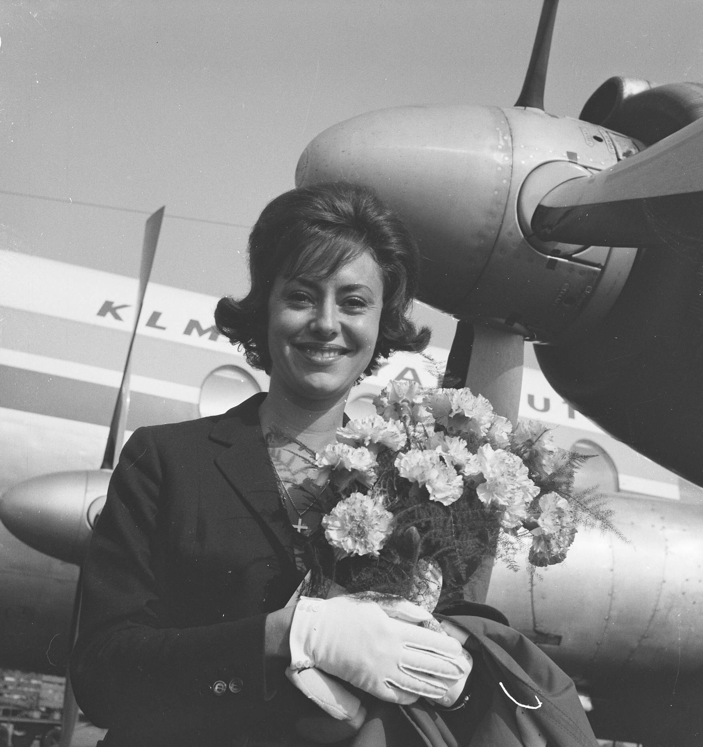 Collectie / Archief : Fotocollectie Anefo Reportage / Serie : [ onbekend ] Beschrijving : Catarina Valente op Schiphol Datum : 4 augustus 1962 Persoonsnaam : Catarina Valente Fotograaf : Nijs, Jac. de / Anefo Auteursrechthebbende : Nationaal Archief Materiaalsoort : Negatief (zwart/wit) Nummer archiefinventaris : bekijk toegang 2.24.01.03 Bestanddeelnummer : 914-1736